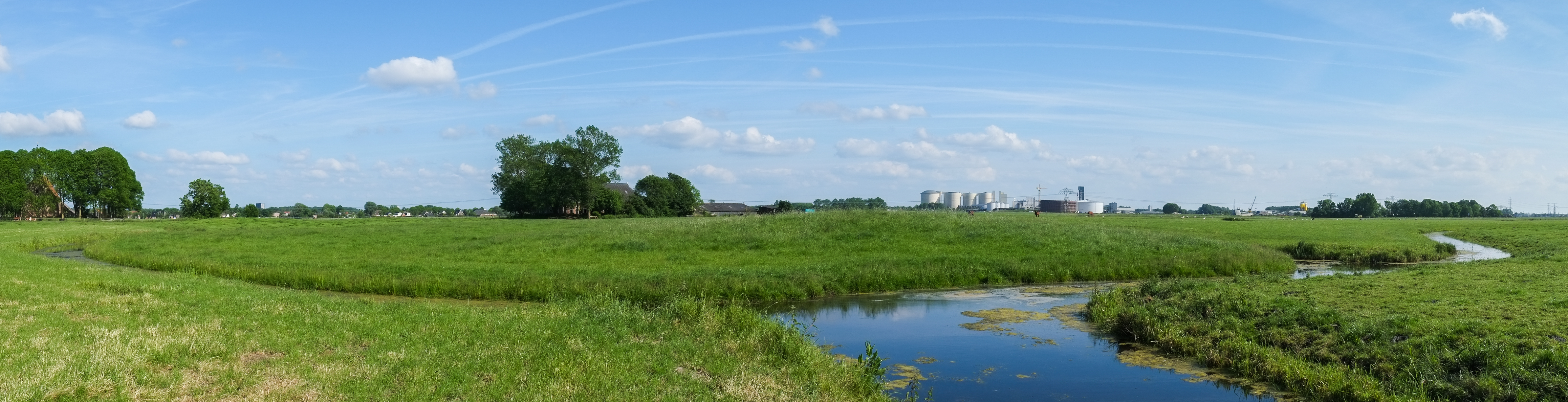 Wierde ten noordwesten van boerderij Leegeweg 40 en ten zuidoosten van boerderij Leegeweg 42